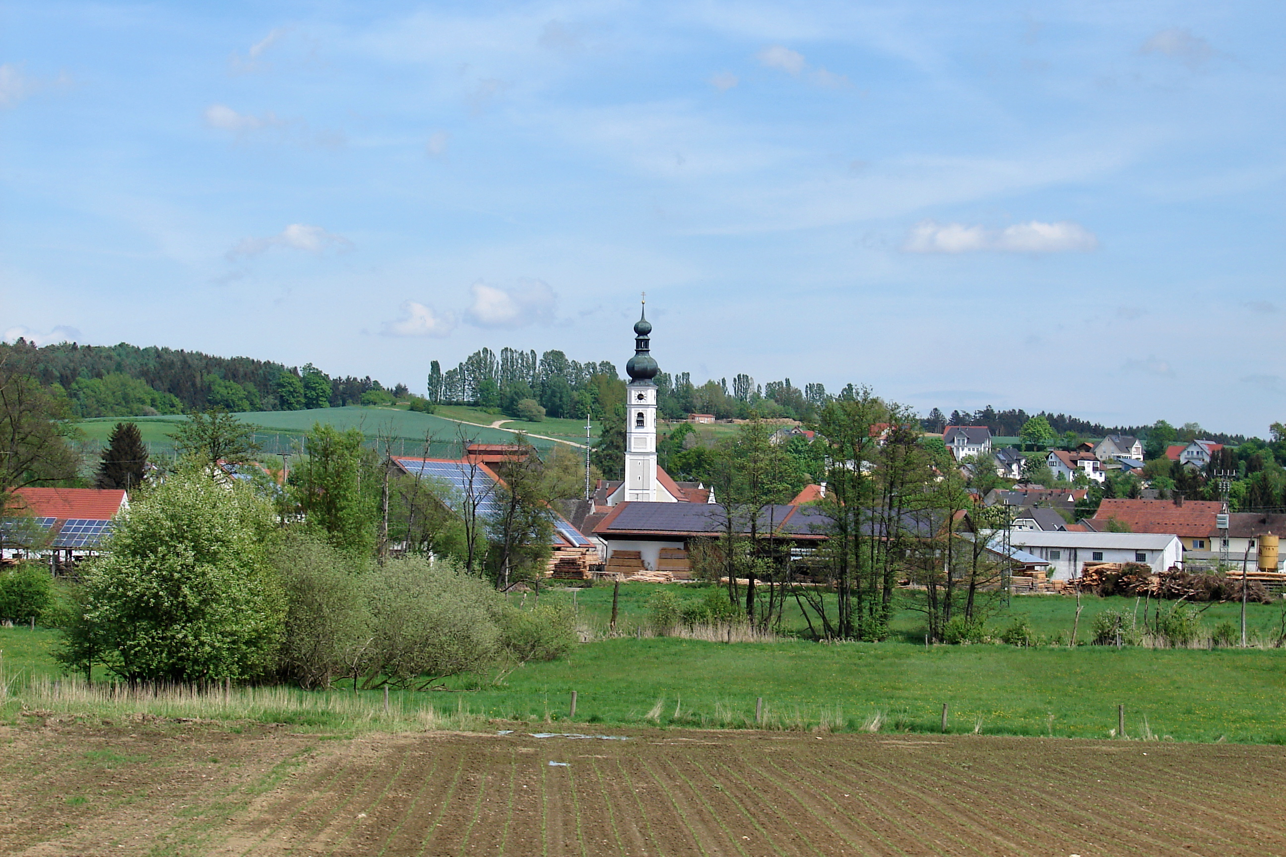 Elsendorf ist eine Gemeinde im niederbayerischen Landkreis Kelheim und Mitglied der Verwaltungsgemeinschaft Mainburg.